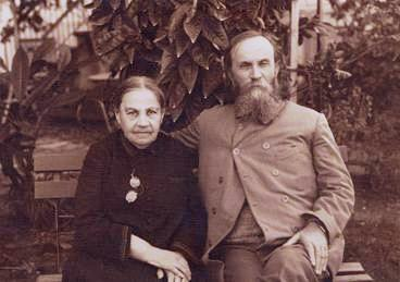 אולגה ויהושע חנקין